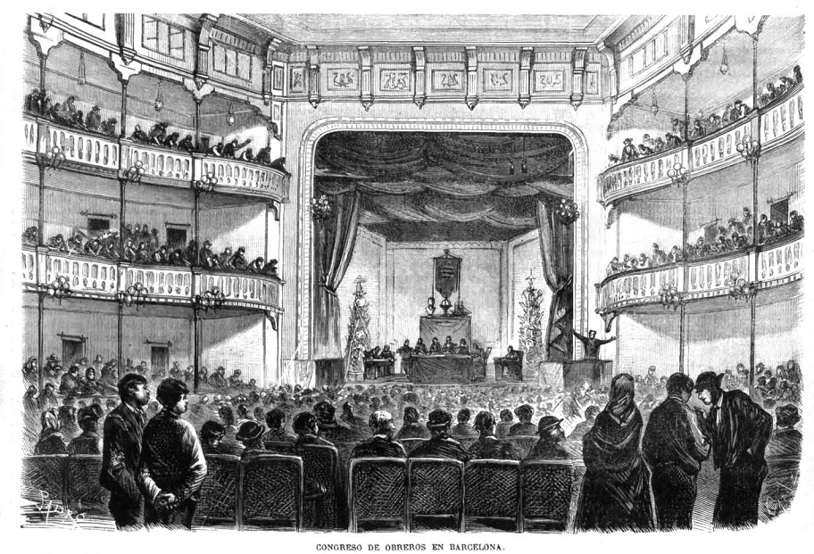 «Congreso de obreros en Barcelona», en la revista española La Ilustración Española y Americana.